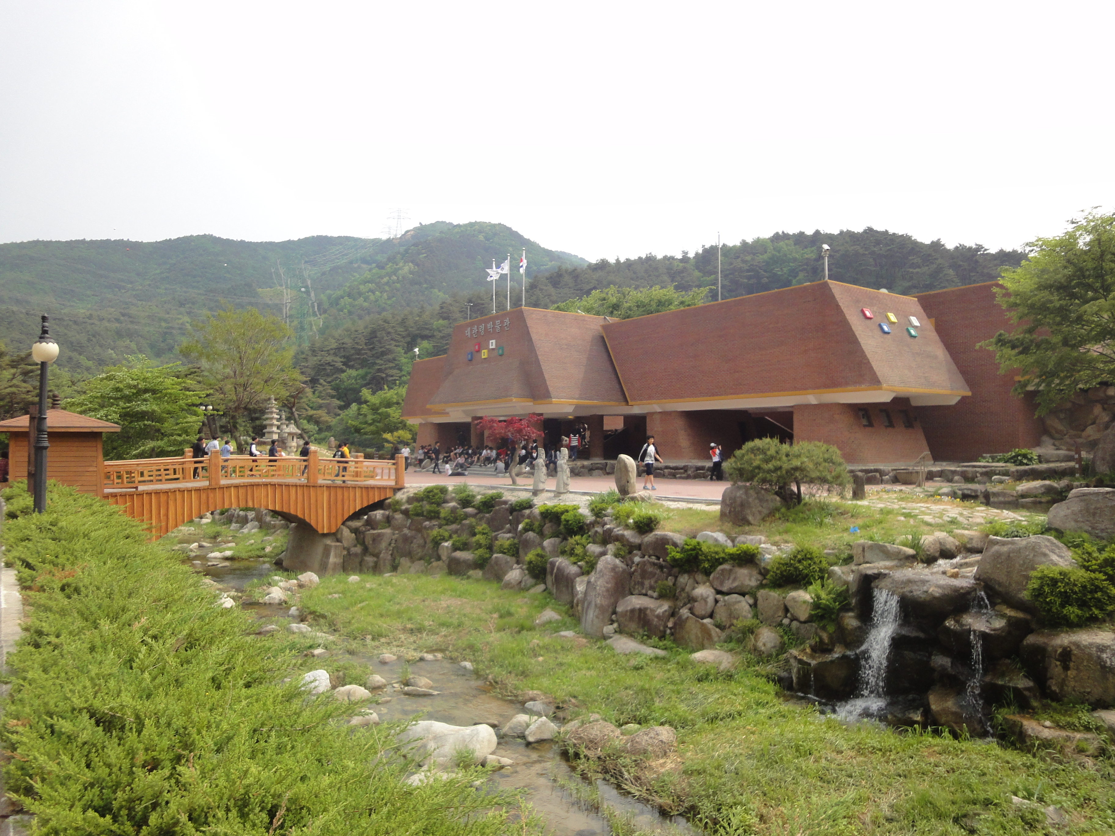 대관령 옛길의 모습